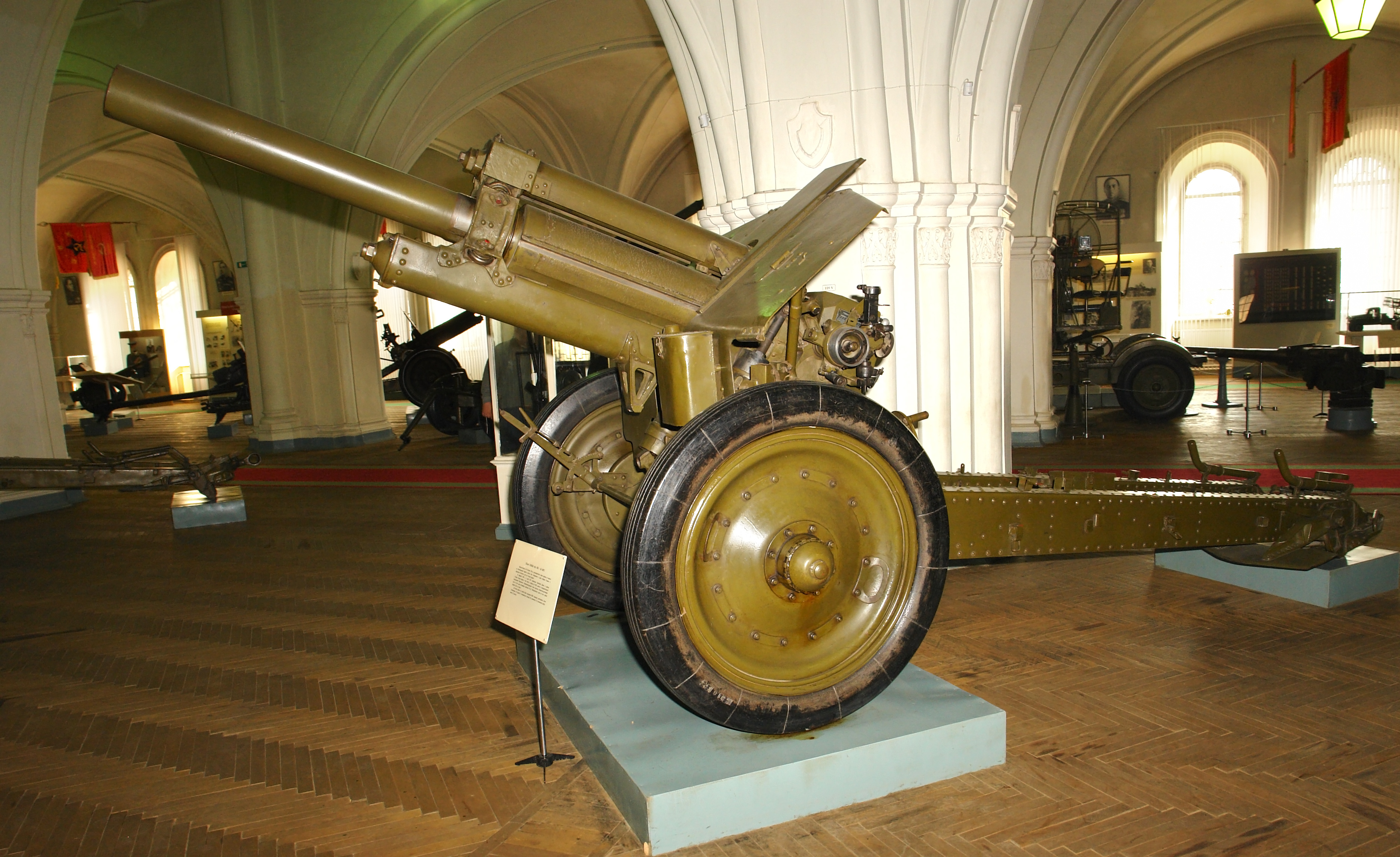 122-мм ГАУБИЦА обр. 1938 г. № 12671. Воины-патриоты 5-й батареи 162-го артиллерийского полка одними из первых на Ленинградском фронте внесли свои сбережения в фонд обороны Родины и попросили изготовить для них четыре орудия. 23 февраля 1944 г., в день 26-й годовщины Советской Армии, в районе г. Нарвы четыре орудия, в том числе и гаубица № 12671, вместе с поздравительной телеграммой Верховного Главнокомандующего были вручены патриотам-артиллеристам. В этот день батарейцы капитана М. М. Лободзинского дали из этих гаубиц первый залп по врагу. До конца войны из гаубиц было выпущено 8000 снарядов, уничтожено сотни гитлеровцев, 10 орудий, 8 минометных батарей, 25 пулеметов, 15 автомашин, разрушено 13 дзотов. Военно-исторический музей артиллерии, инженерных войск и войск связи, Санкт-Петербруг.